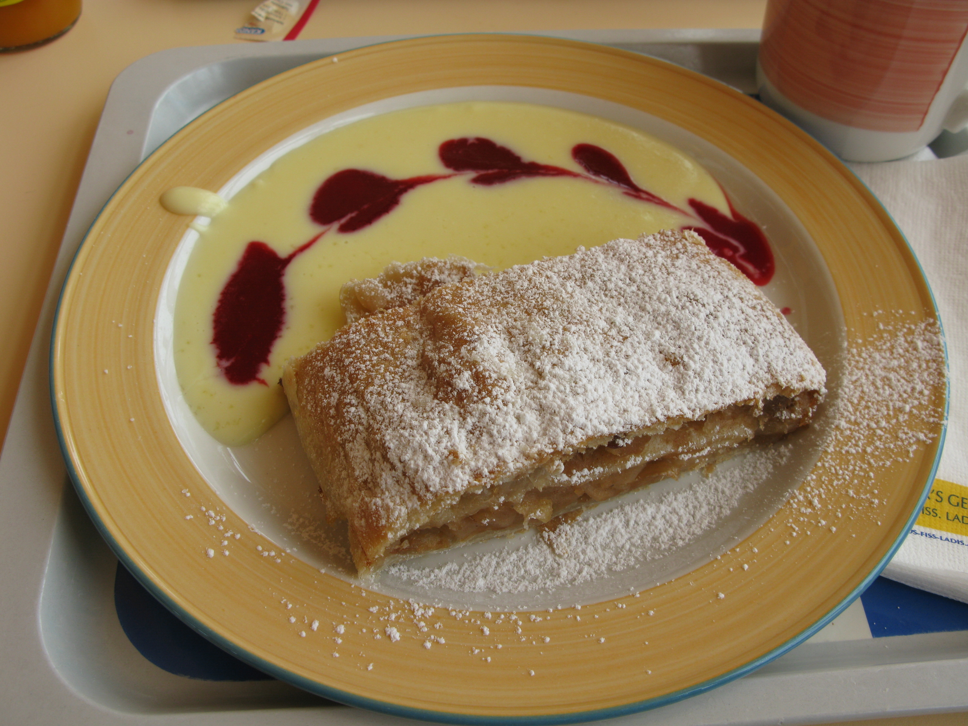 Apfelstrudel in Panoramarestaurant Komperdell. Serfaus-Fiss-Ladis. Austria, 2012.